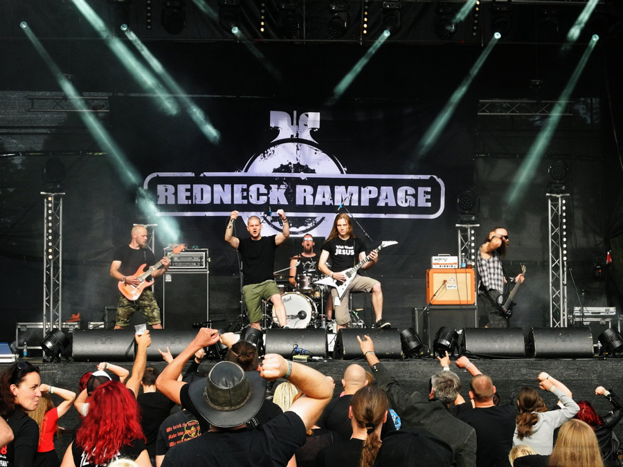 Metal ansambel Redneck Rampage esinemas muusikafestivalil Hard Rock Laager 2019.